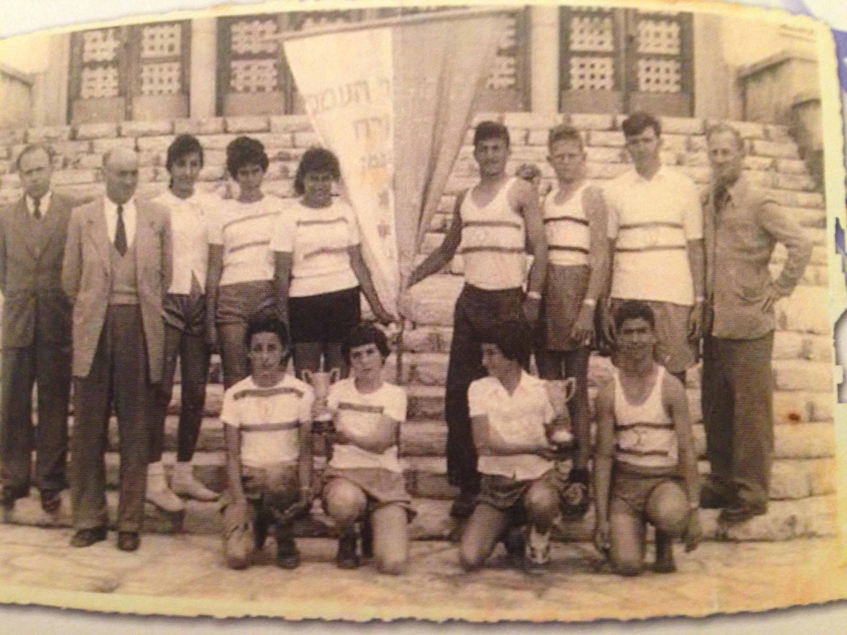 טקס מצטייני ספורט בתחרות בית ספרית באדיבות אוסף התצלומים של ארכיון בית ראשונים"- מוזיאון לתולדות הרצליה